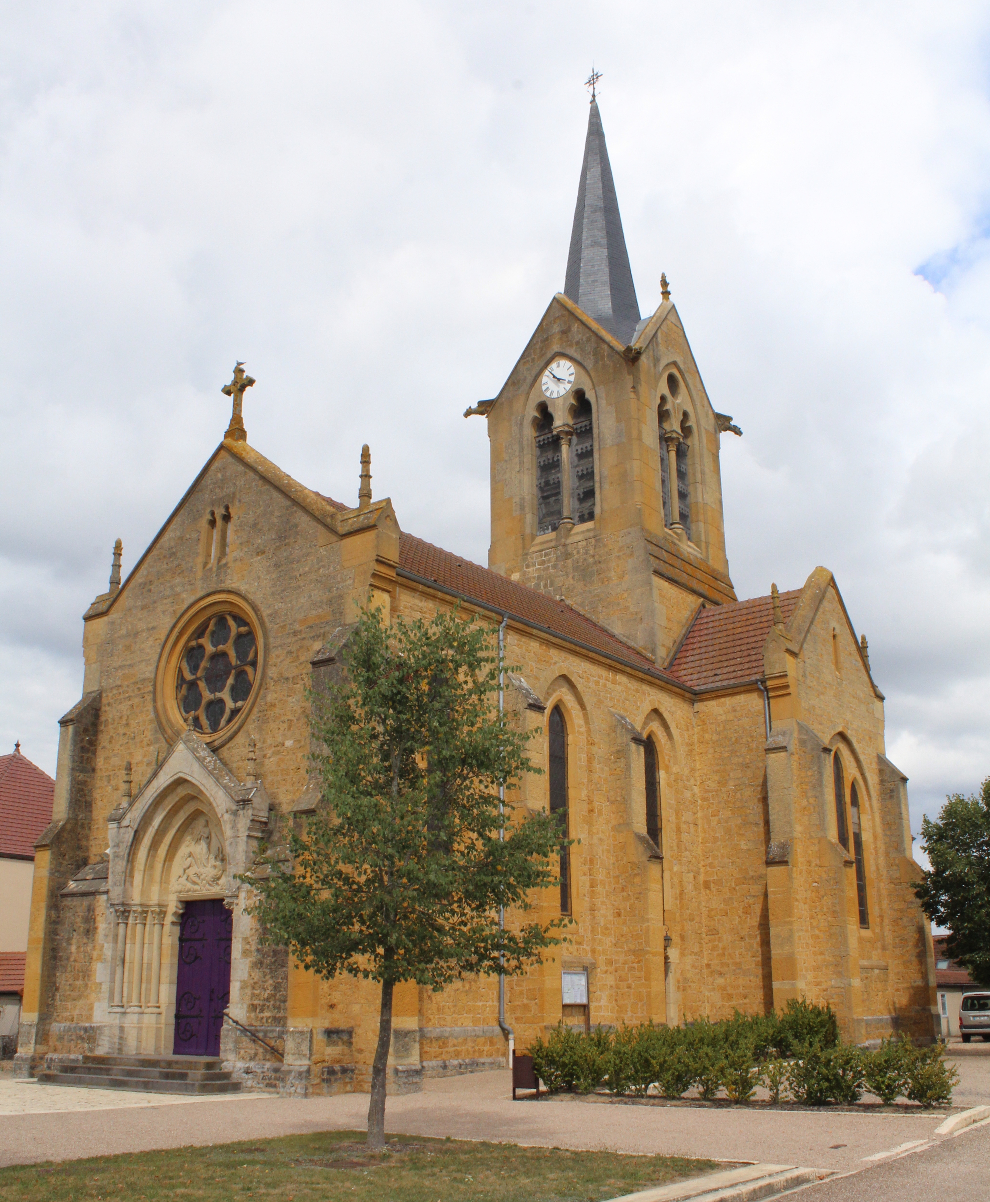 Église Saint-Sylvestre de L'Hôpital-le-Mercier.